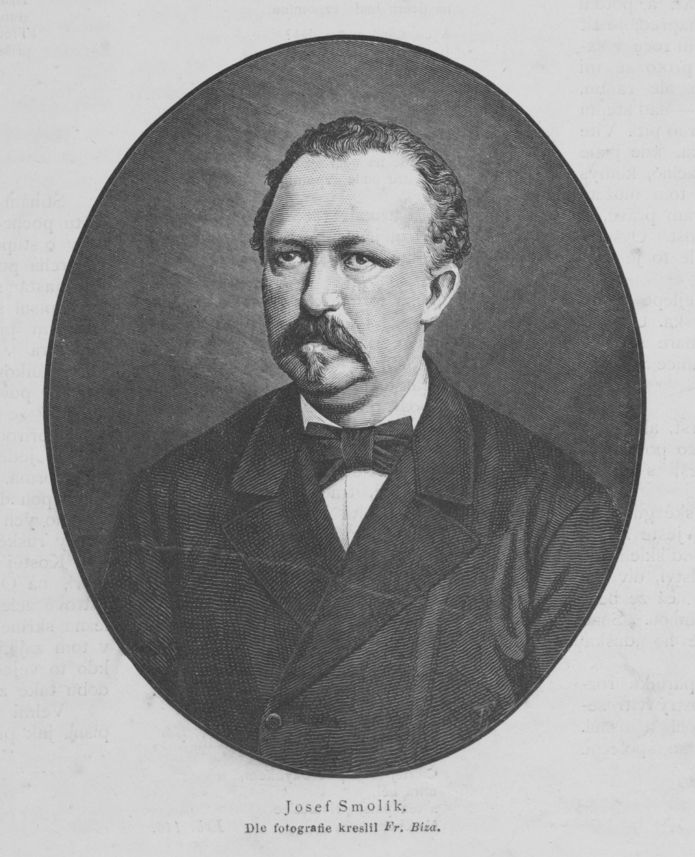 Josef Smolík (1832-1915), český numizmatik, historik a matematik